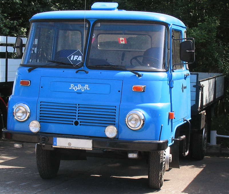 Beschreibung: Robur Fotograf: Darkone, 2. Juli 2005